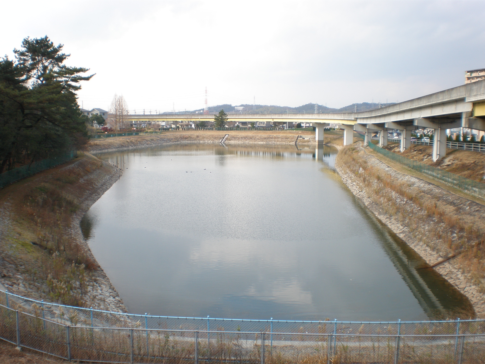 愛知県小牧市にある四ツ池